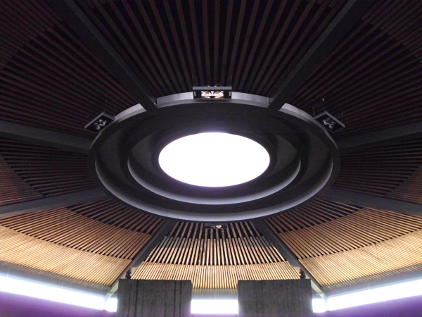 Seminarkapelle Fulda Decke mit Lichtkuppel